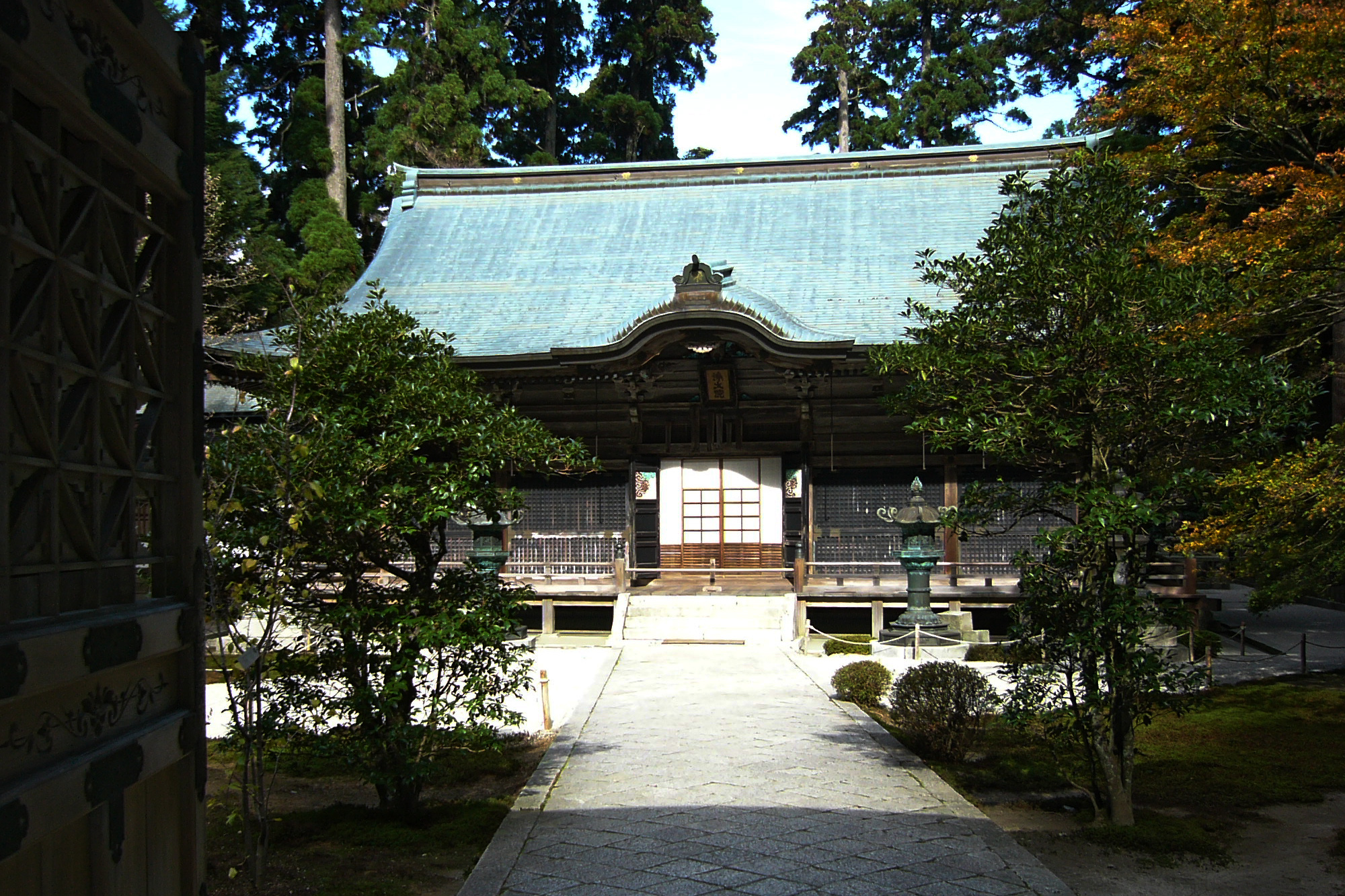 Enryaku-ji_Jodoin (延暦寺浄土院), Otsu, Shiga prefecture, Japan